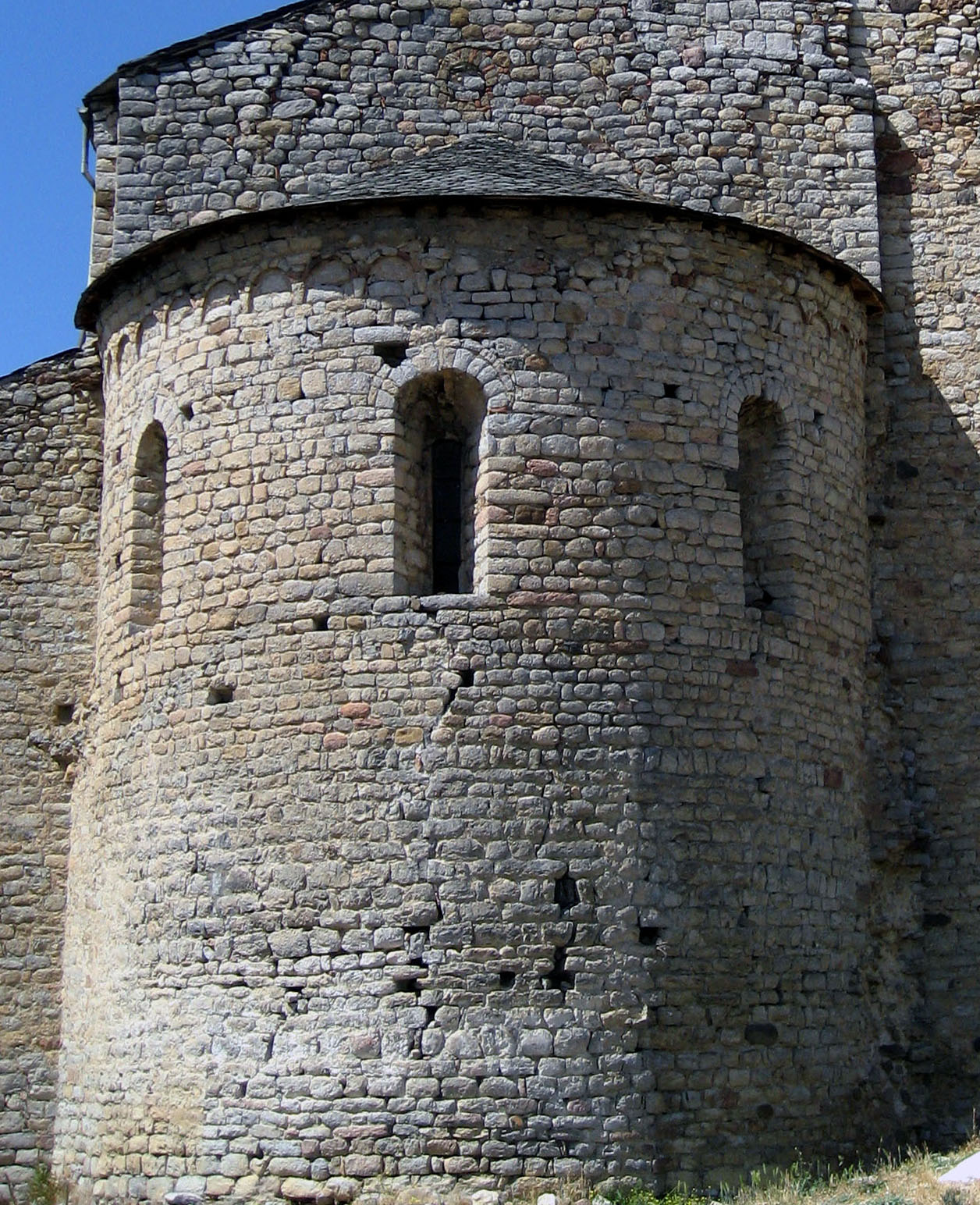 Absis amb arcuacions llombardes de Santa Maria de Talló. Baixa Cerdanya. Catalunya